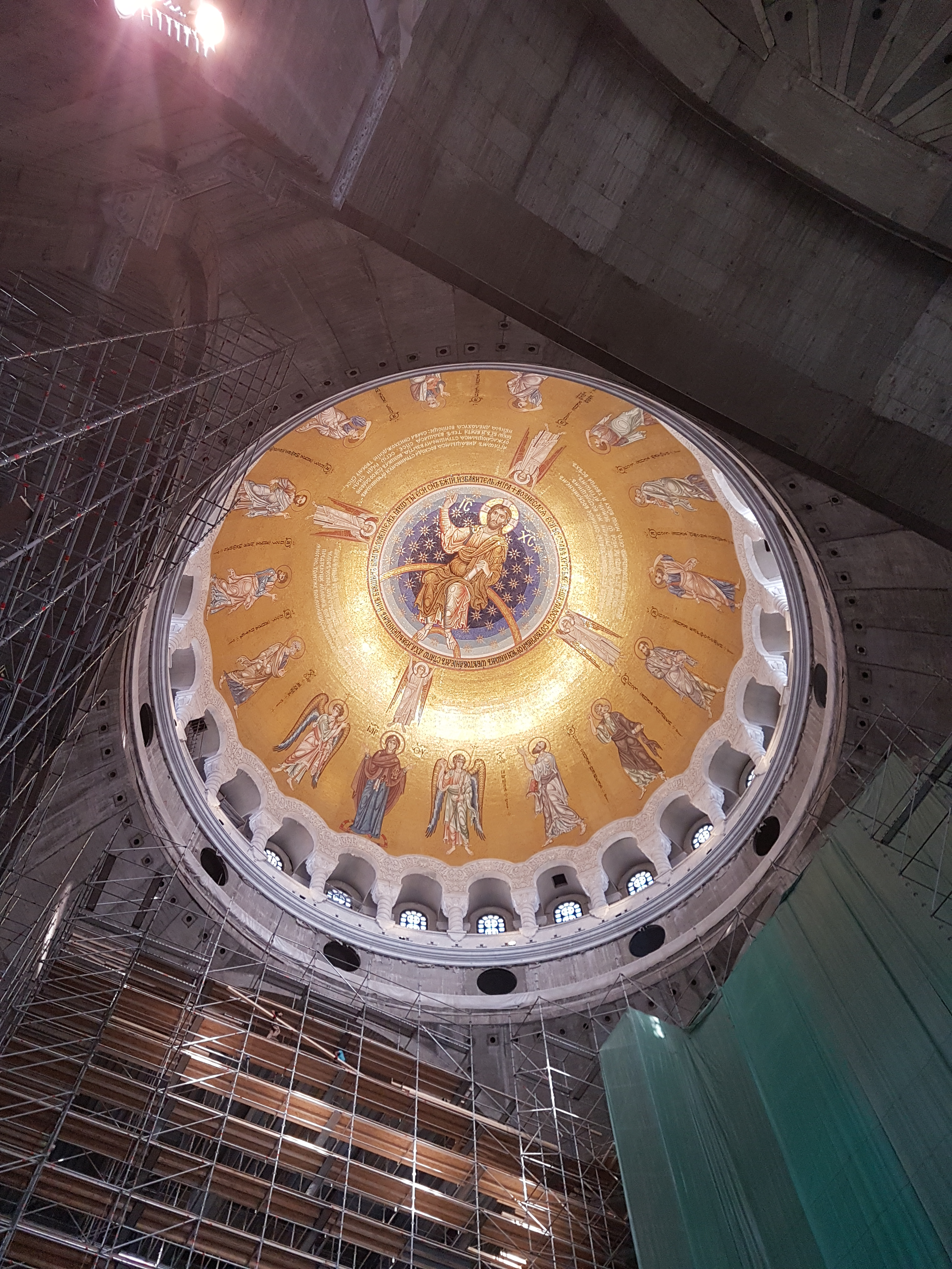 Dome de saint sava avec christ pantocrator